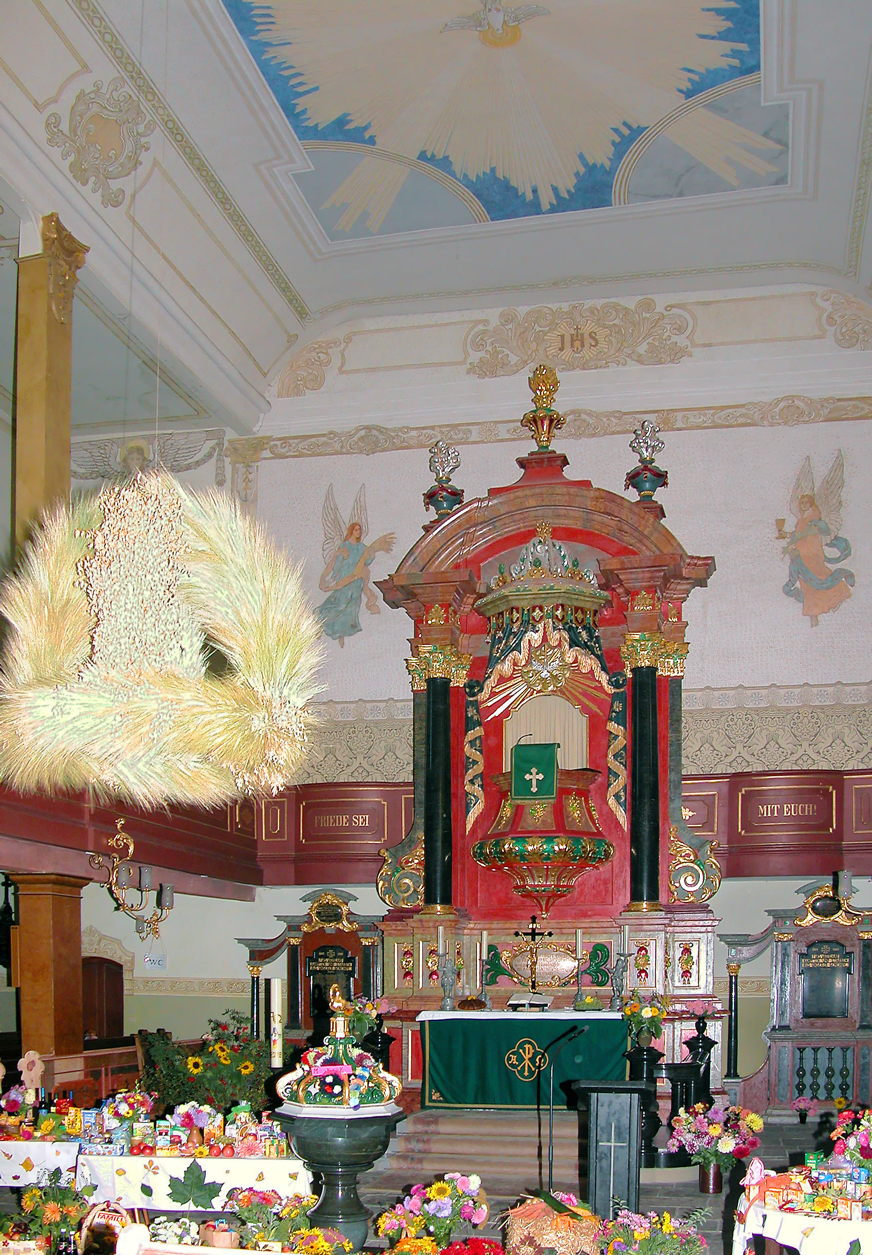 24.09.2006 09517 Zöblitz, Am Marktplatz (GMP: 50.657349,13.231239): Evangelische Kirche, Barockbau, 1729 von Johann Christian Simon aus Dresden. Kanzelaltar, 1732 von Simon entworfen. Schmuck zum Erntedankfest. [DSCN11638.TIF]20060924065DR.JPG/Blobelt